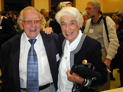 Farbfoto von Herbert und Ingeborg Remmer im Jahr 2000